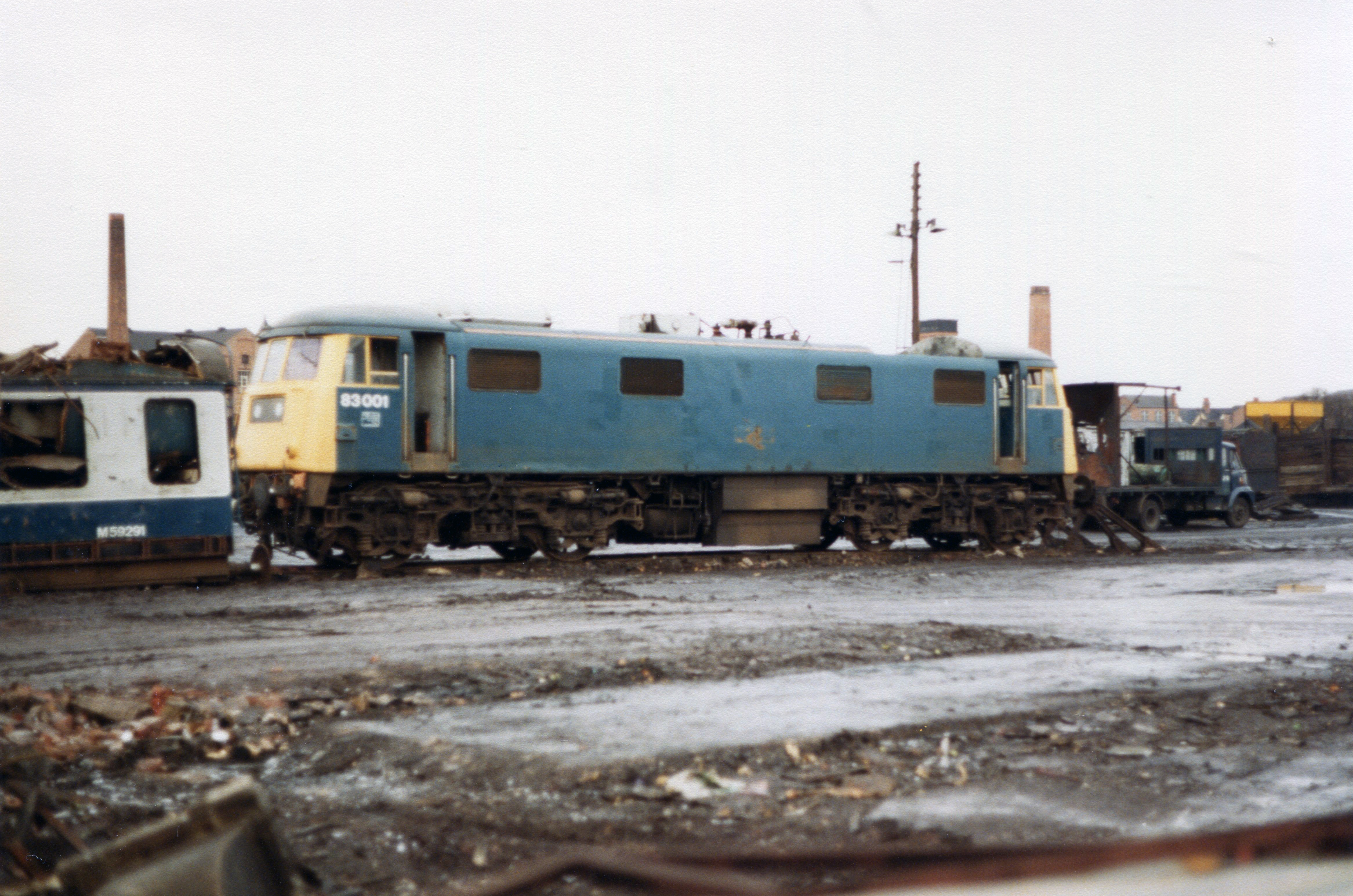 83001 - Vic Berrys Leicester